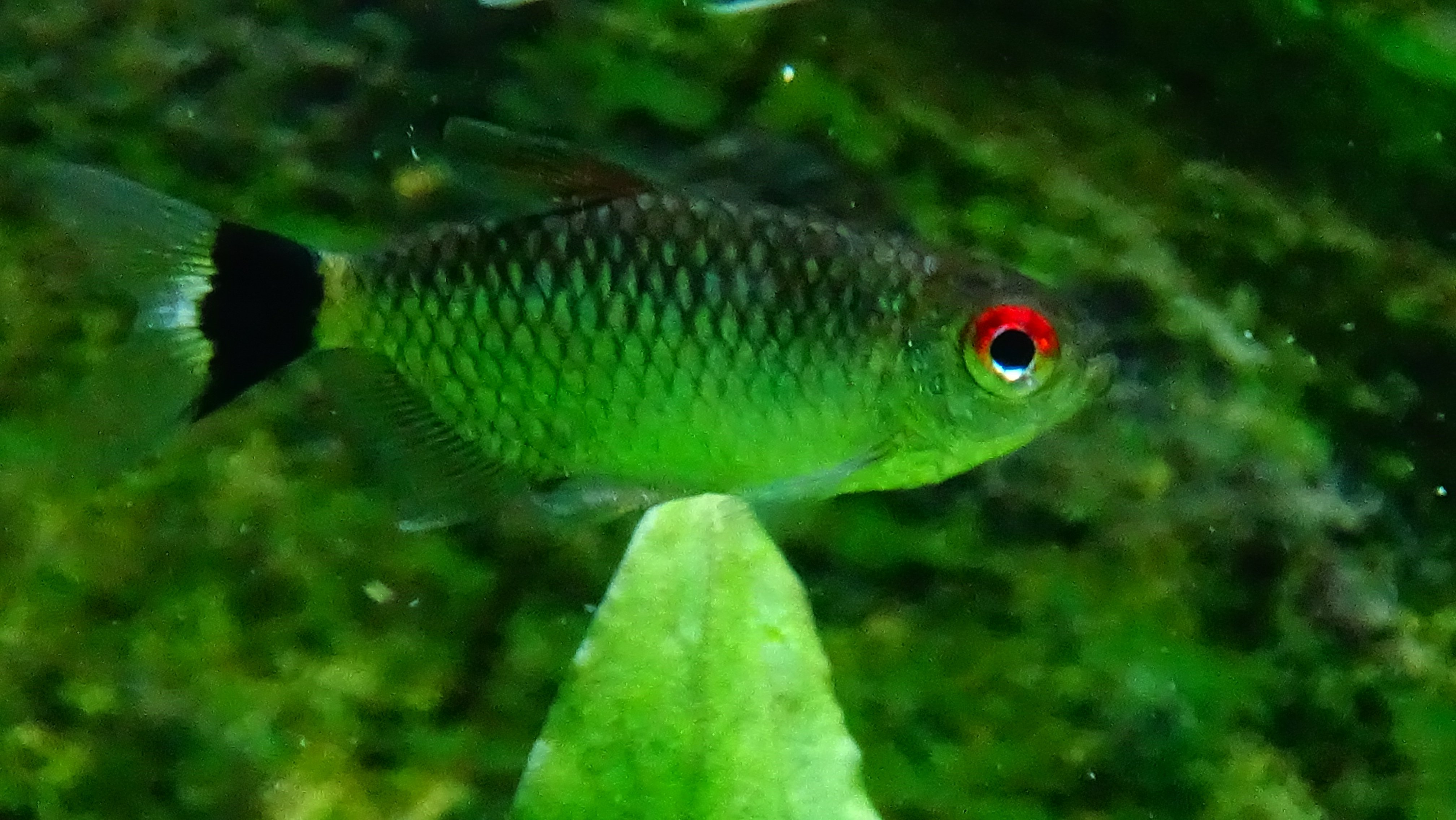 Moenkhausia sanctaefilomenae - Tétra yeux rouge - Aquarium tropical du Palais de la Porte Dorée - 12/2014